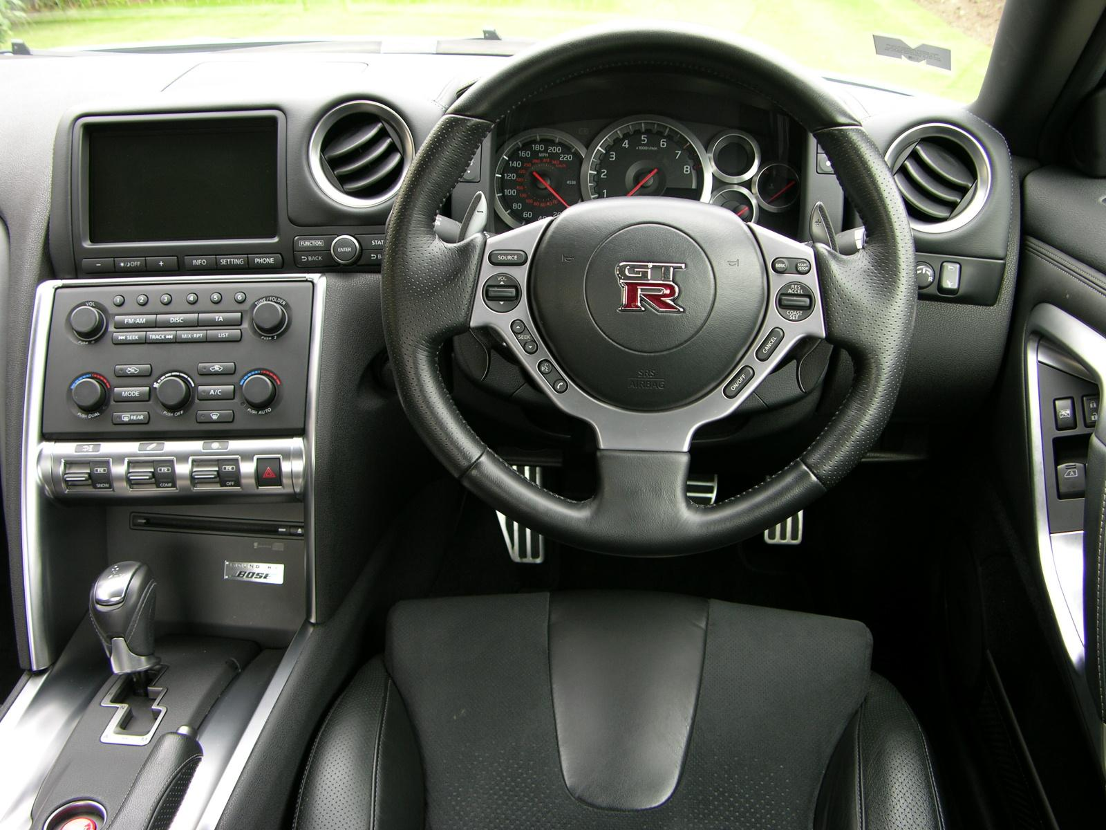 2009 Nissan GT-R Premium